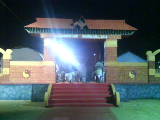 പാഞ്ഞാൾ അതിരാത്രത്തിന്റെ കവാടം